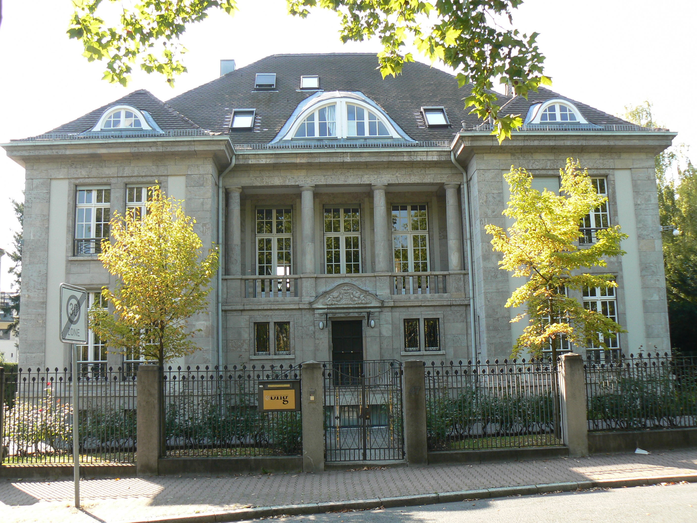 ehem.Villa Herxheimer